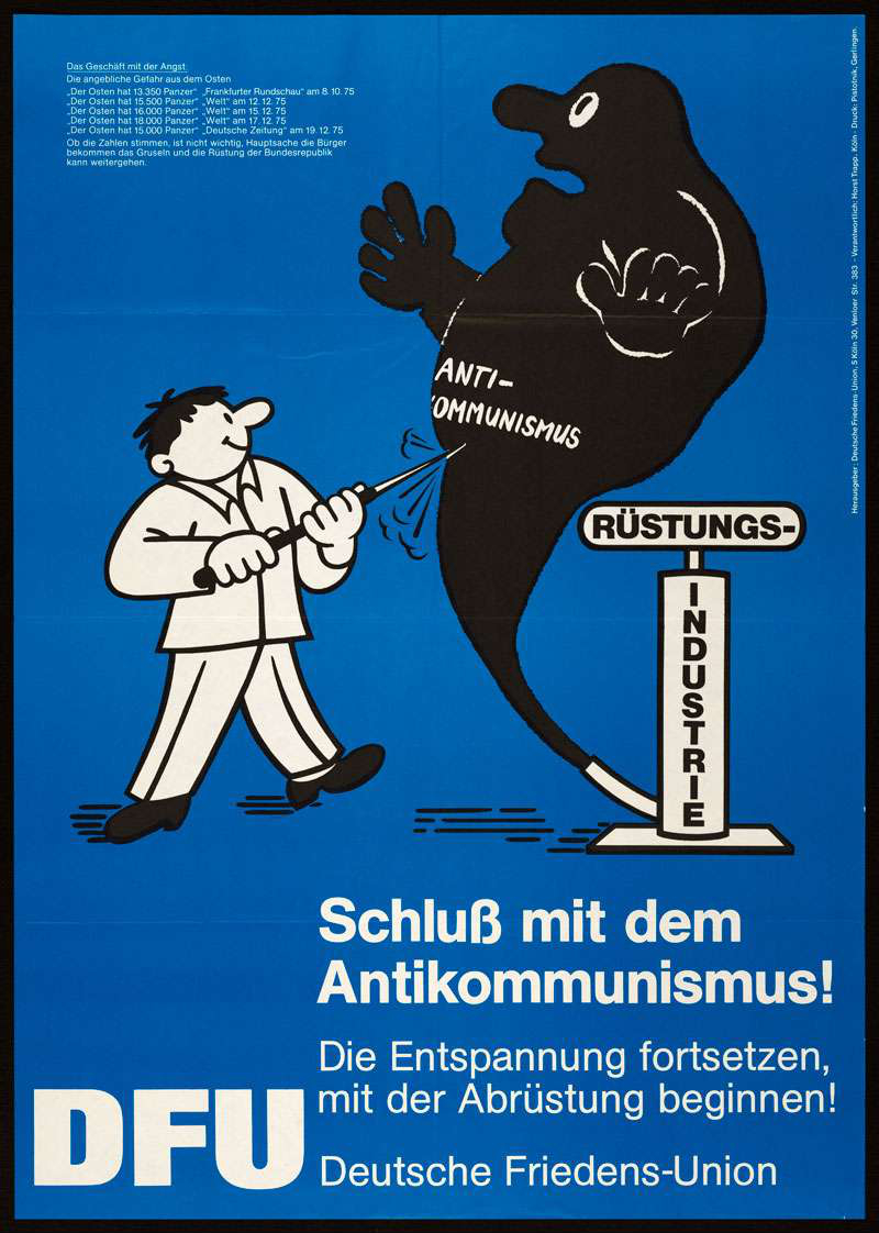 Plakat der Deutschen Friedens-Union zur Landtagswahl in Baden-Württemberg 1972